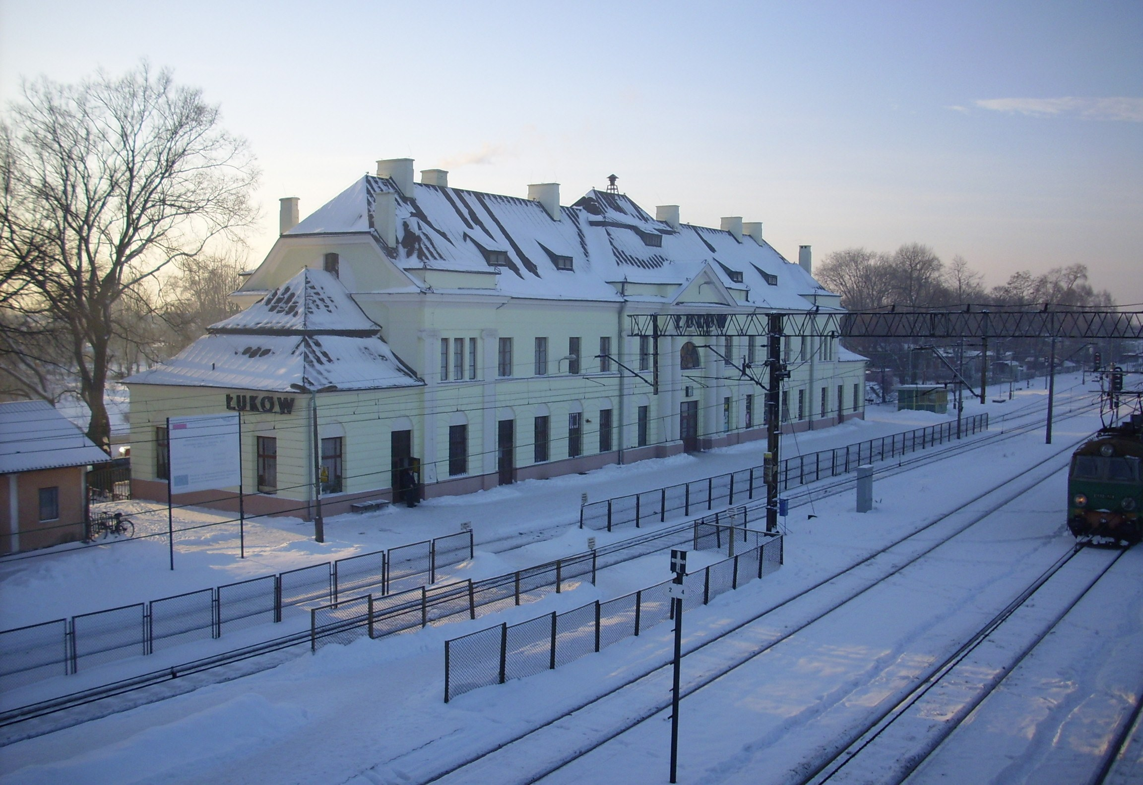 Łuków. Stacja kolejowa. Widok z kładki dla pieszych nad peronami.